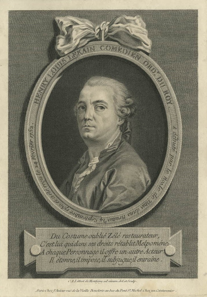 Kupferstich: Der französische Schauspieler Lekain (Henri Louis Cain, 1728/1729-1778)